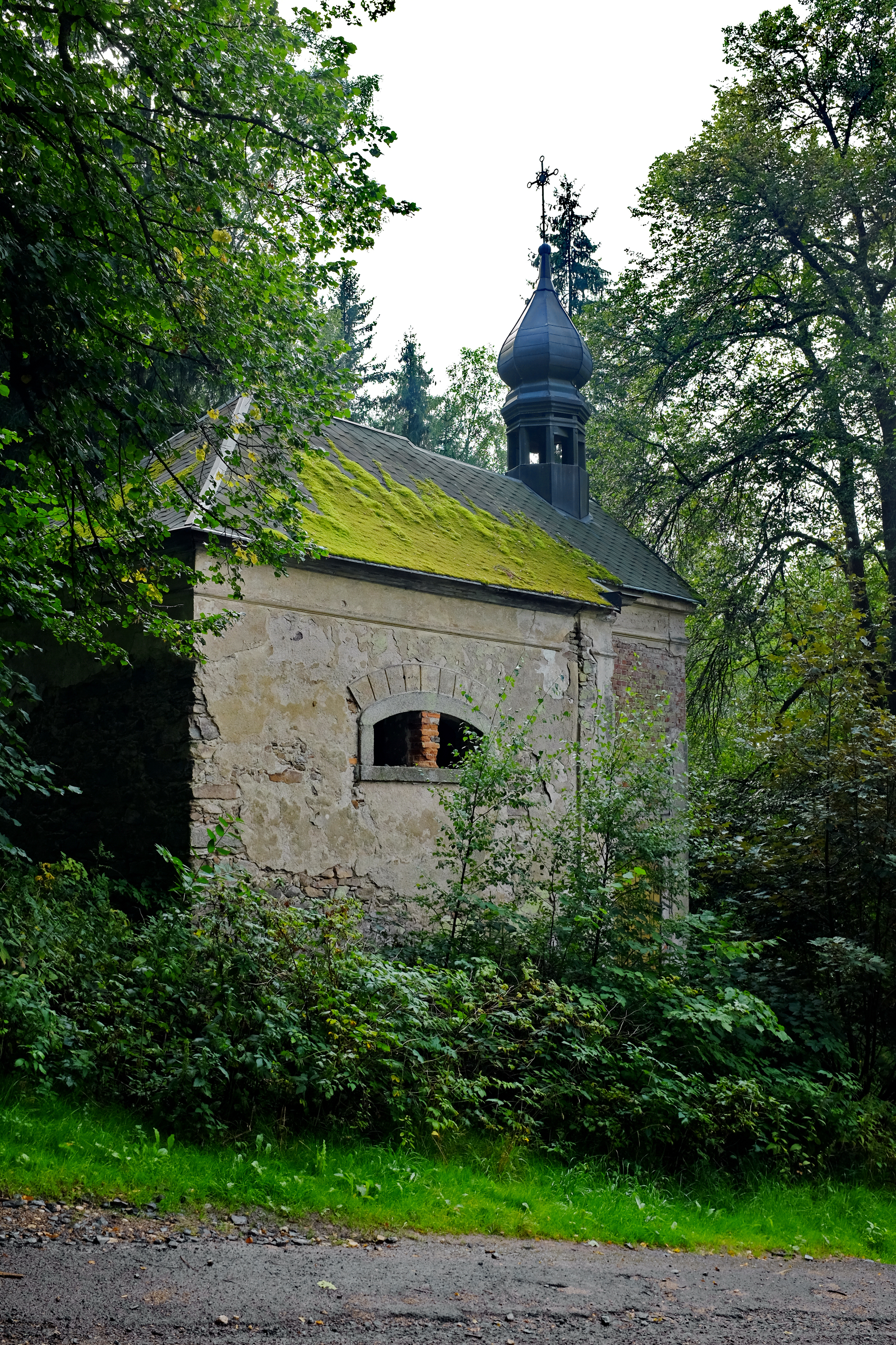 Kaple svatého Vojtěcha, st. 173, proti domu čp. 48, Sklená.